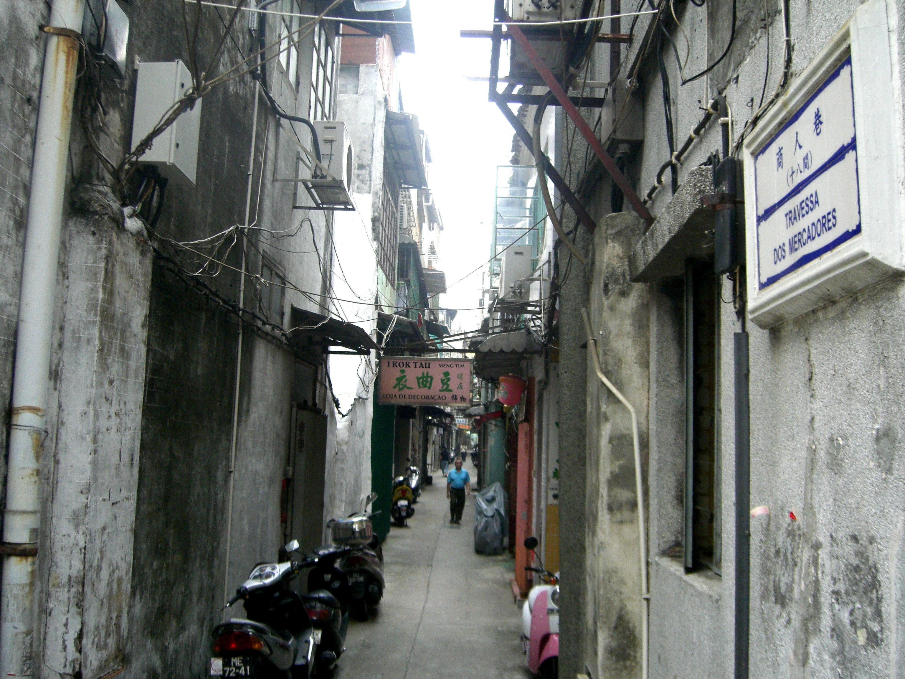 Travessa dos Mercadores